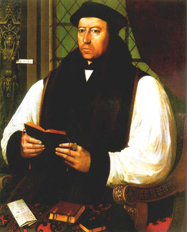 Thomas Cranmer (1489-1556) im 56. Lebensjahr von Gerlach Flicke Der Erzbischof von Canterbury hält die Episteln des Paulus in der Hand. Auf dem Tisch liegt die Schrift des Augustinus "Glaube und Werk". Cranmer unterstützte die antipäpstliche "Act of Supremacy". Unter Edward VI. führte er das 1. und 2. "Book of Common Prayer" ein. Im Auftrag der Königin Maria I ("Bloody Mary") wurde er verhaftet und als Ketzer verbrannt.